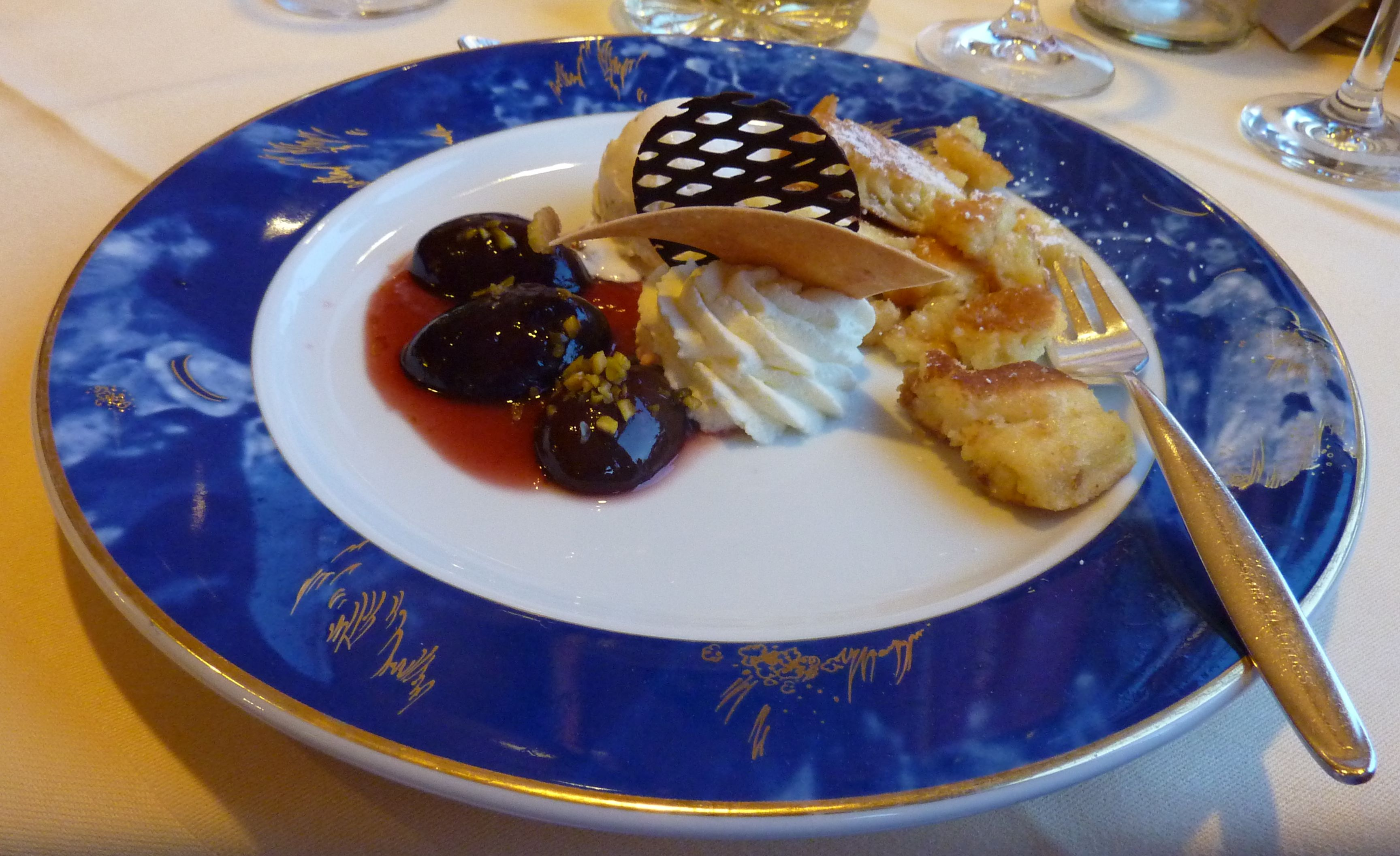 Kaiserschmarrn mit Pflaumen, Sahne, Eis...